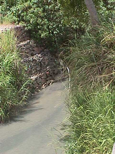 Quebrada La Guairita previo a la confluencia con la quebrada La Boyera detrás del edificio del KFC La Trinidad a una altura de 975 msnm